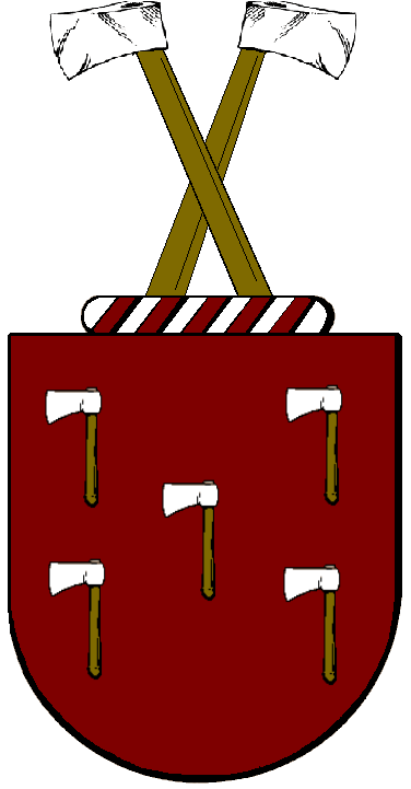 Armas da Família Machado